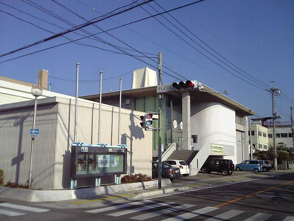 ＵＴＹ会館（テレビ山梨旧局舎）